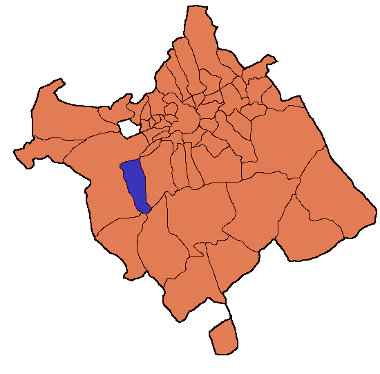 situacion de sangonera la verde en el municipio de murcia